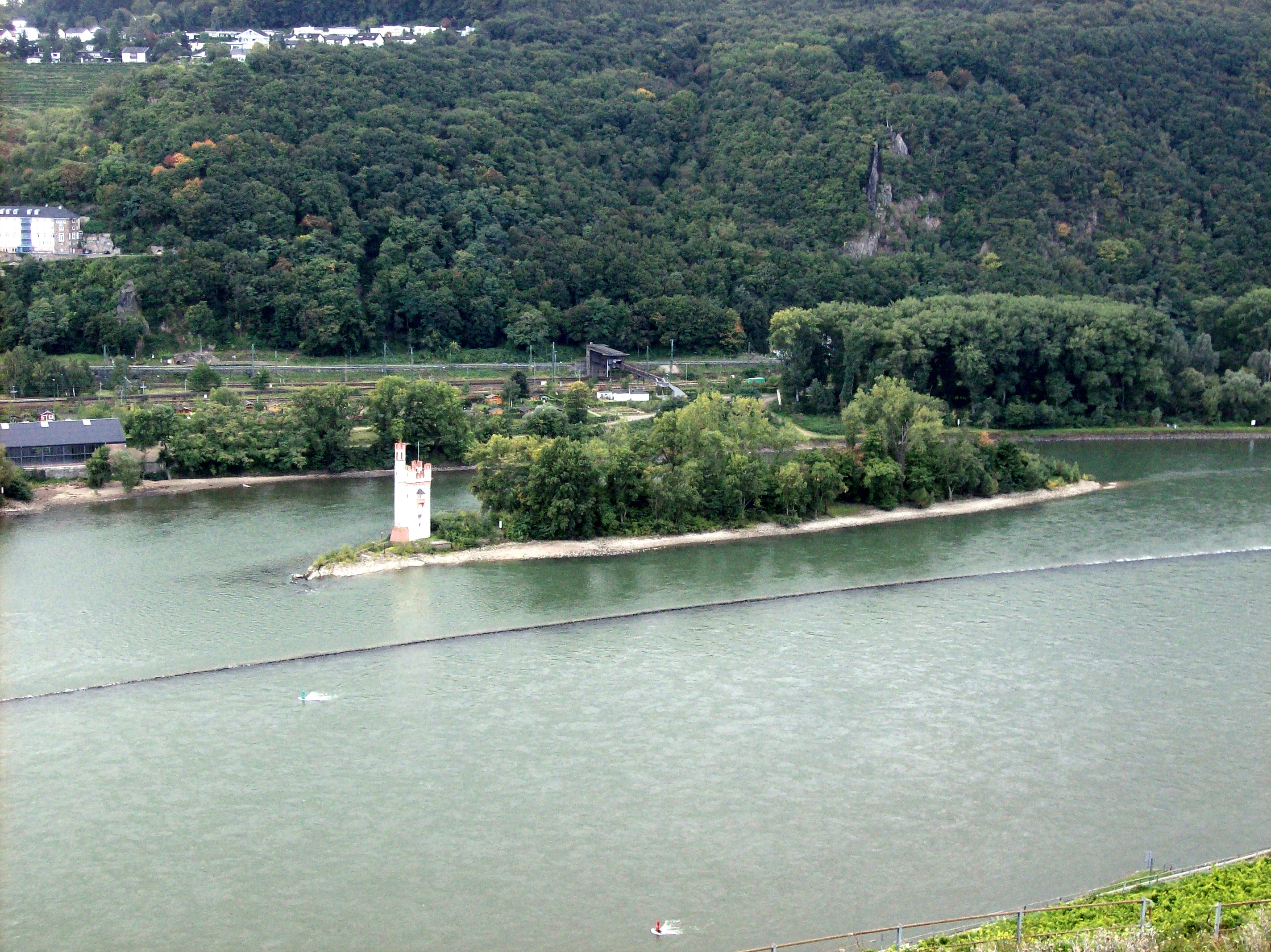 Mäuseturm bei Bingen